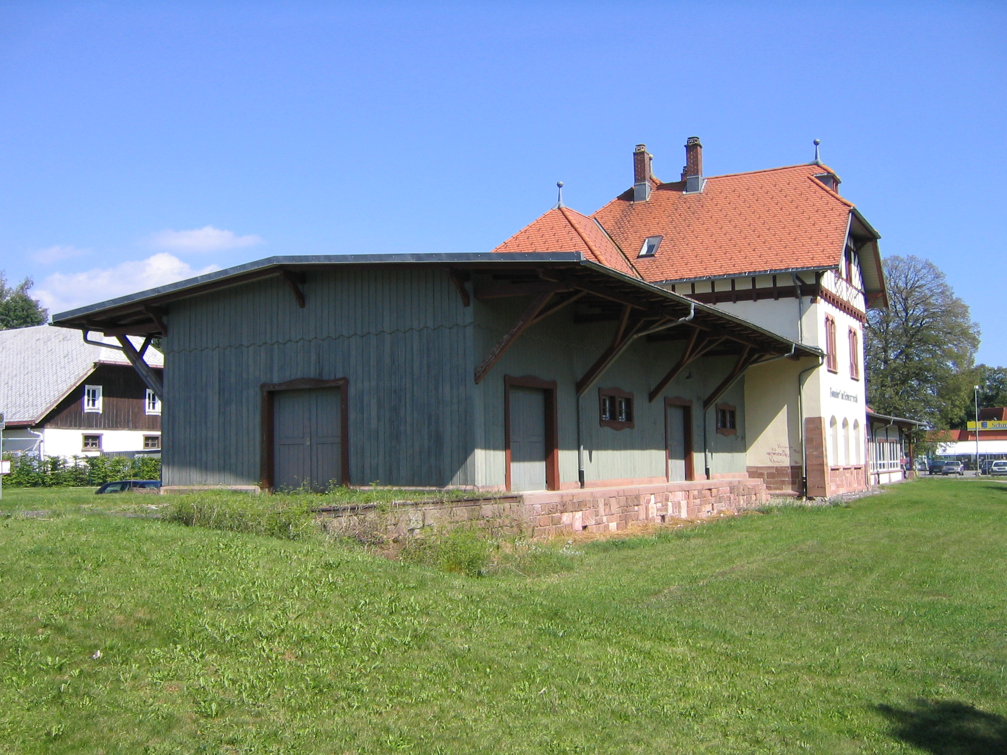 Former station of Bonndorf, Baden-Württemberg, Germany